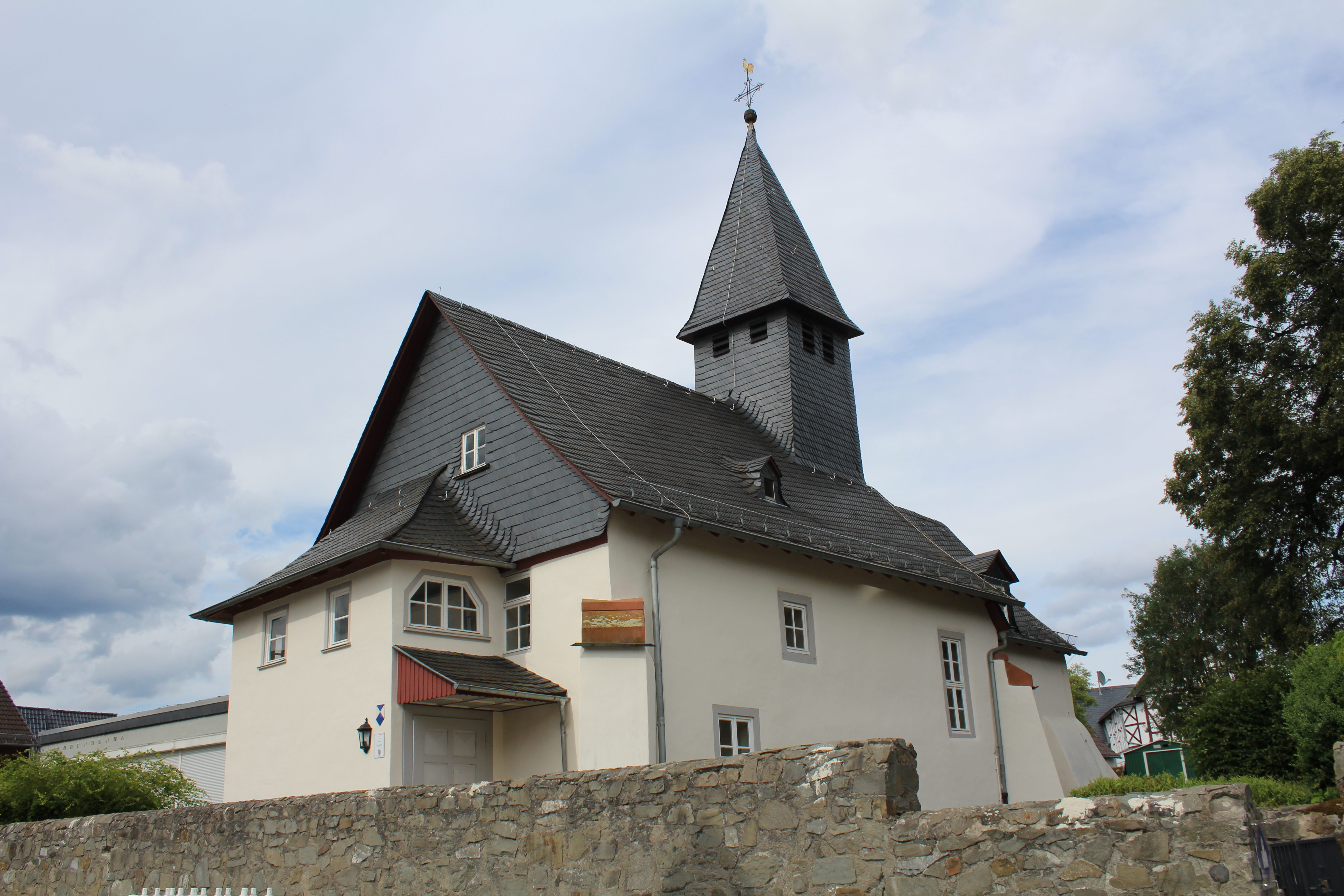 Ev. Kirche Laufdorf, Lahn-Dill-Kreis, Hessen, Deutschland